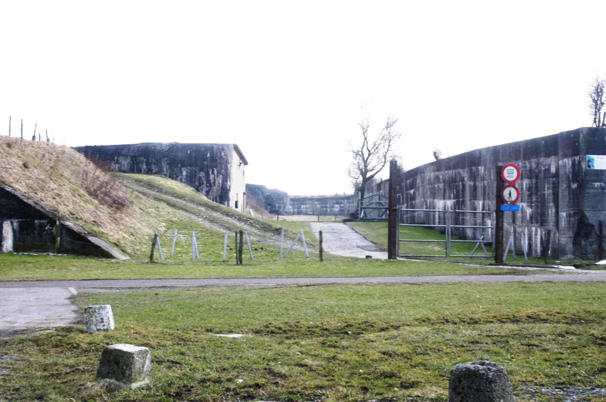 Escarpe am Fort de Battice.